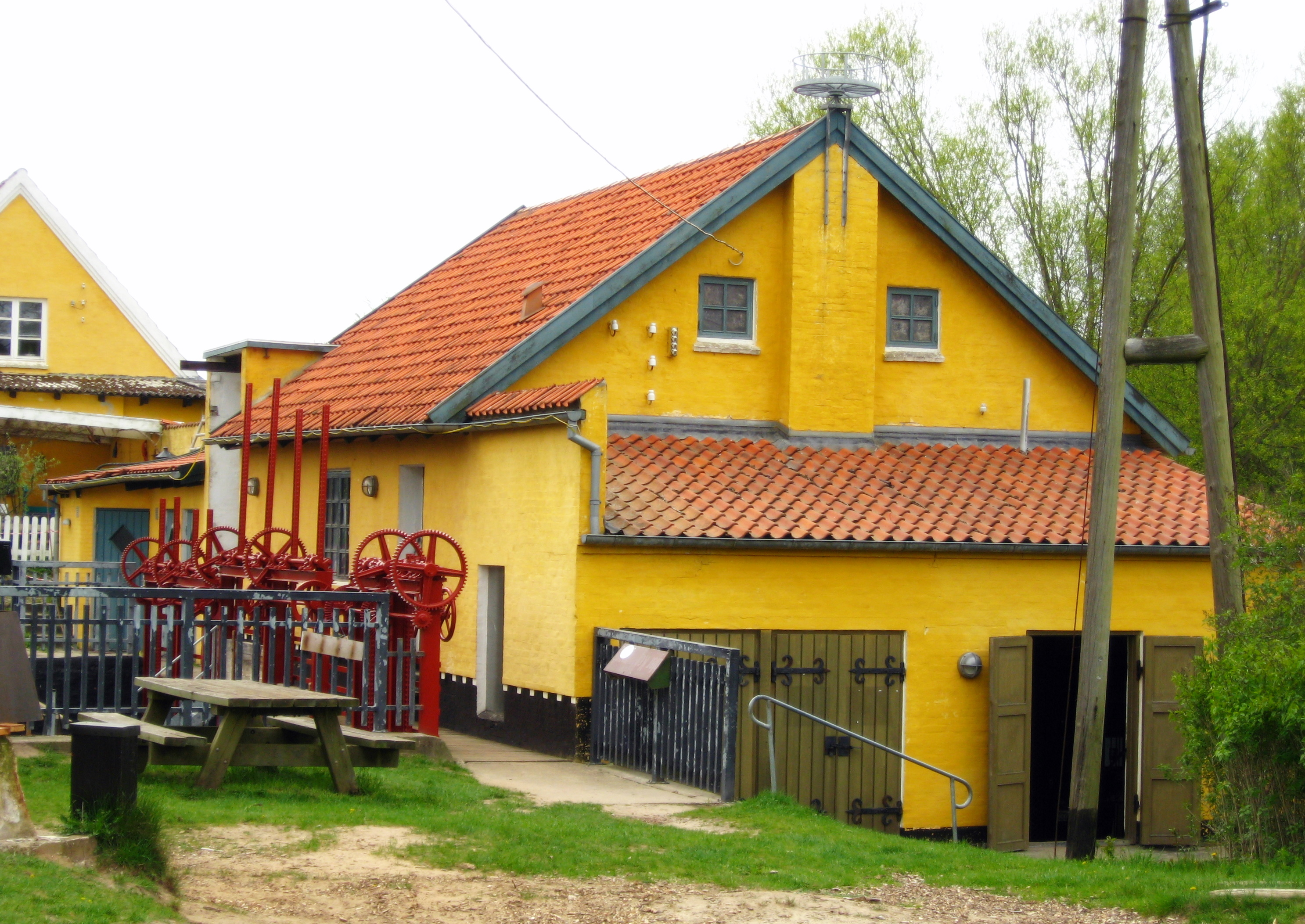 Danmarks eneste fungerende jævnstrøms-elektricitetsværk - Bindslev, Hjørring Kommune